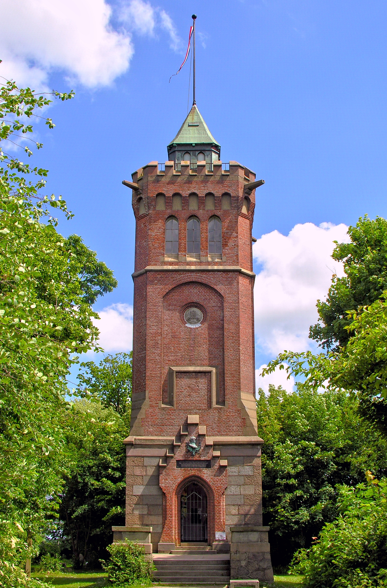 Bismarckturm am Scheersberg bei Groß-Quern/Steinbergkirche aus dem Jahr 1903 mit einer Höhe von 32.30 m 1903 - Foto Wolfgang Pehlemann DSCN9487. - Die Höhenangabe entstammt dem WP-Artikel zum Turm, wird aber zwischenzeitlich von mir in Zweifel gezogen, weil der Turm über 97 Treppenstufen incl. oberer Wendeltreppe verfügt, was rechnerisch keine Annäherung an 32,3 m Bauwerkshöhe ergäbe... - Fragezeichen... erledigt - man rechnet die Spitze der Fahnenstange mit...